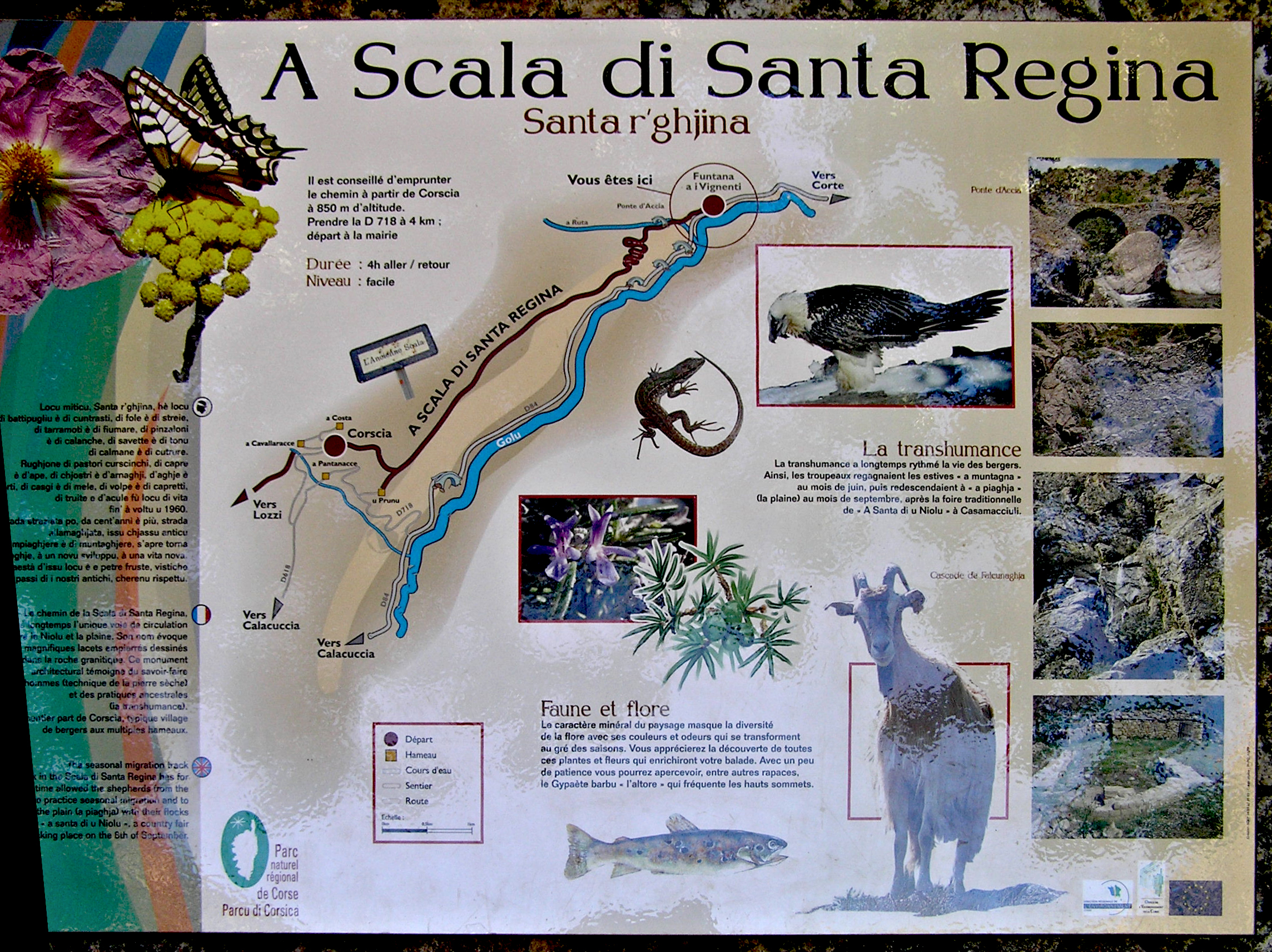 Corscia (Corsica) - Scala di Santa Regina